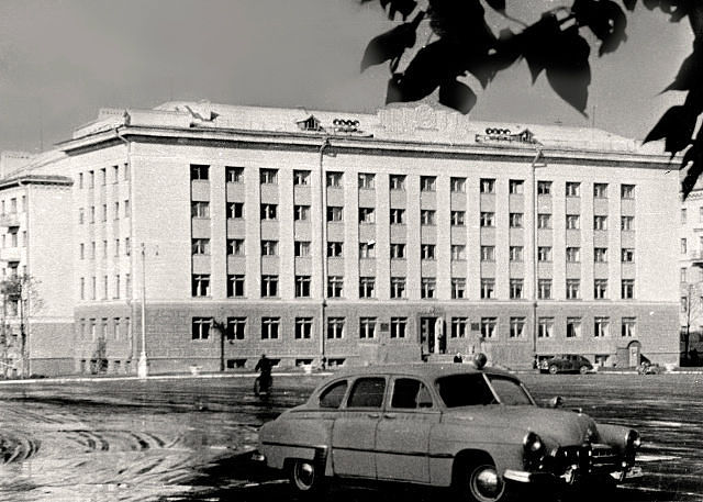 Мэрия города Октябрьский.(60-ые)